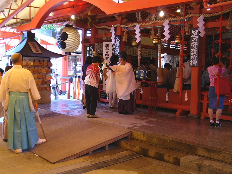 服部天神宮 平成18年度 足の守護祈願大祭 宮司が特大金幣を授ける